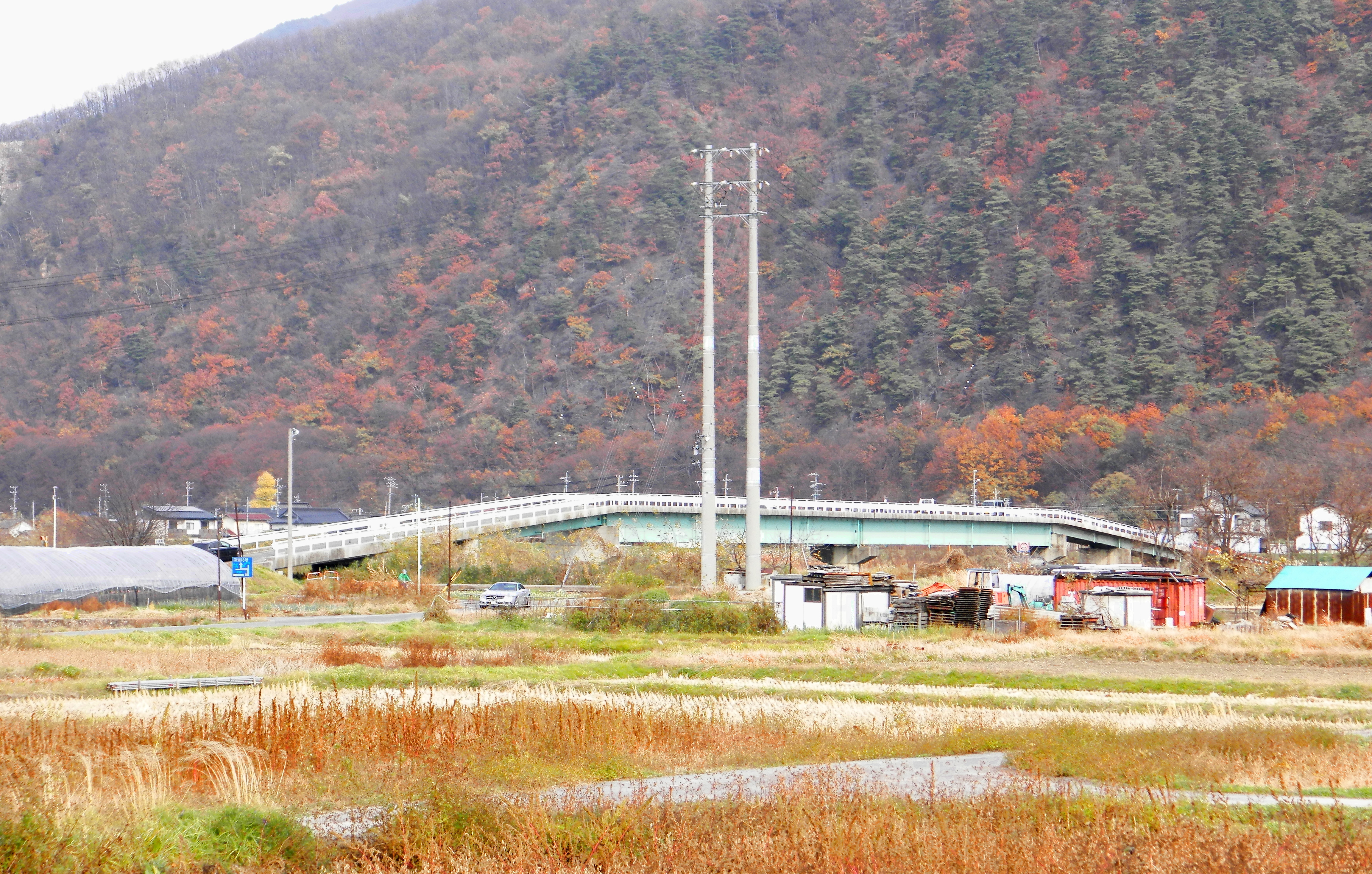 西側の千曲市力石方向から見た笄橋。所在地：長野県坂城町坂城苅屋原